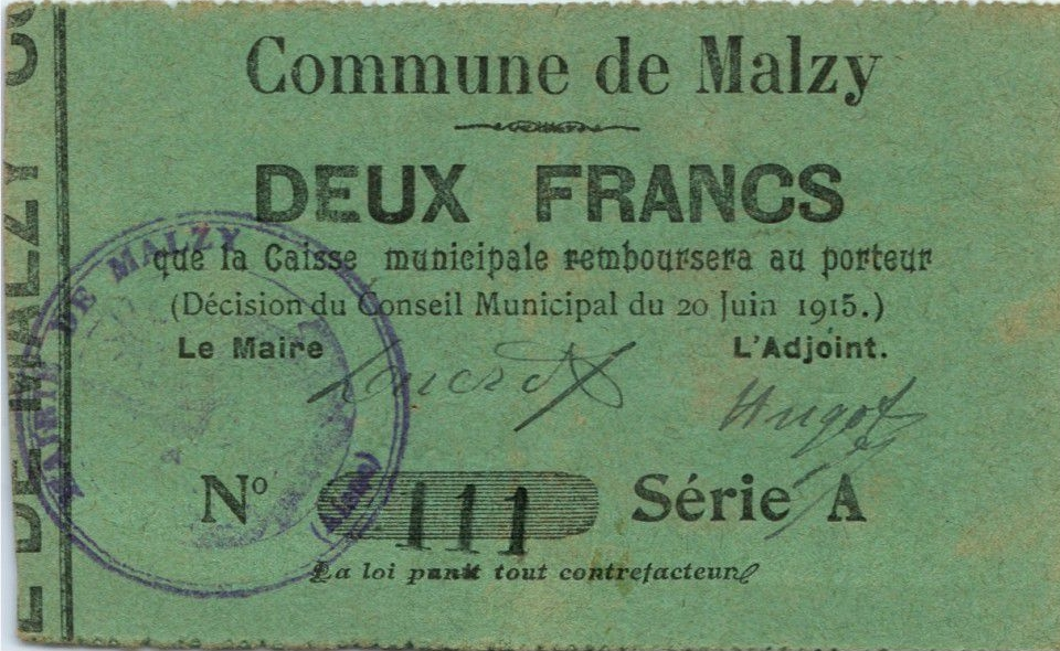 Bon municipal